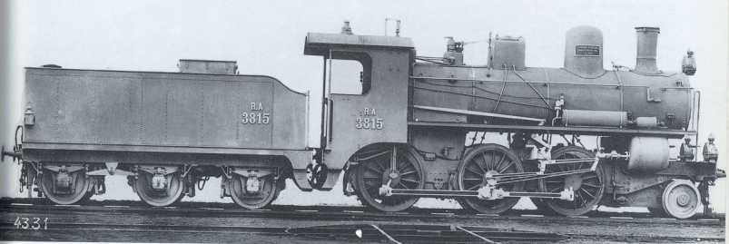 Locomotiva RA 380, poi FS 600